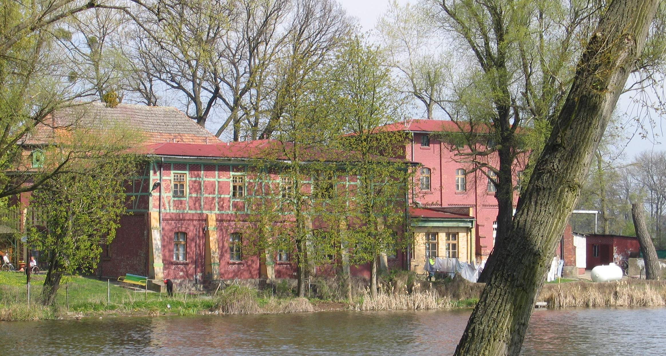 d.dom zdrojowy (ob.DPS) Trzcińsko Zdrój, Trzcińsko Zdrój